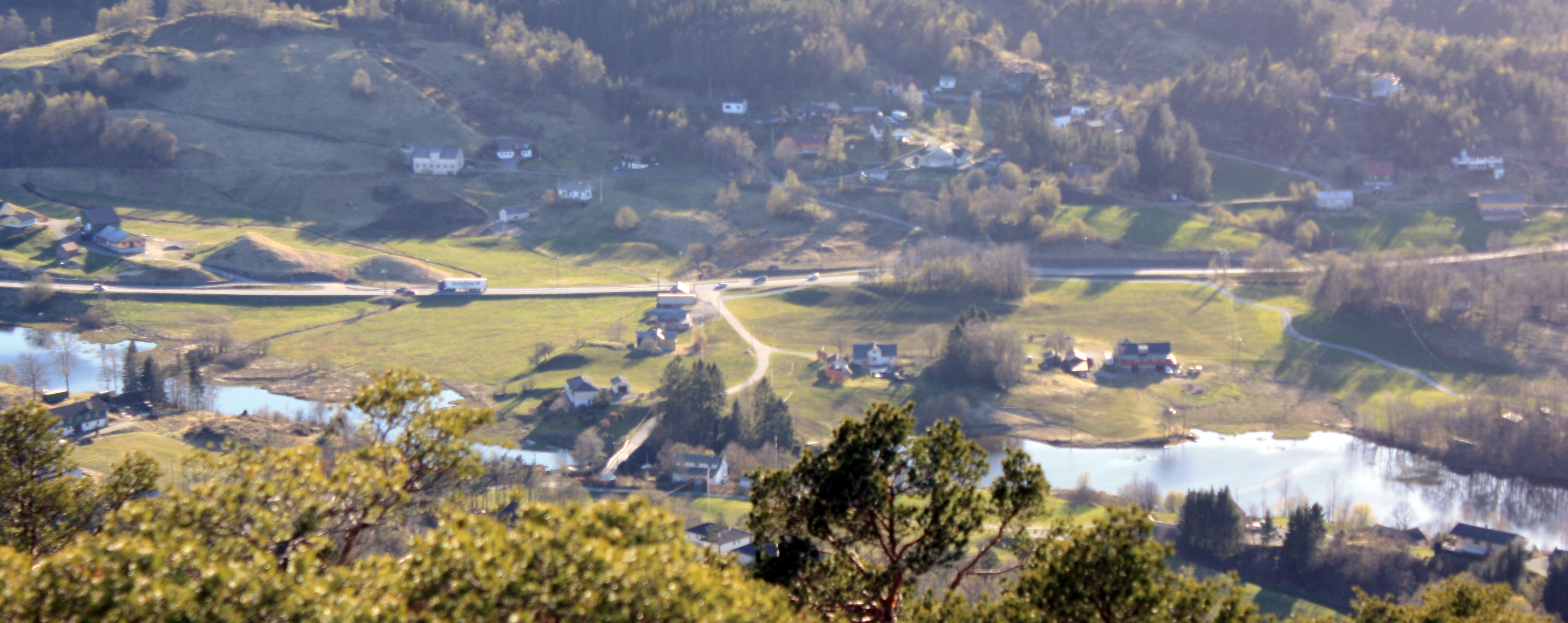 Bahus and Fortunet from Ørnhaugen, Fana, Bergen.